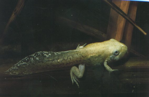 Pelobates cultripes